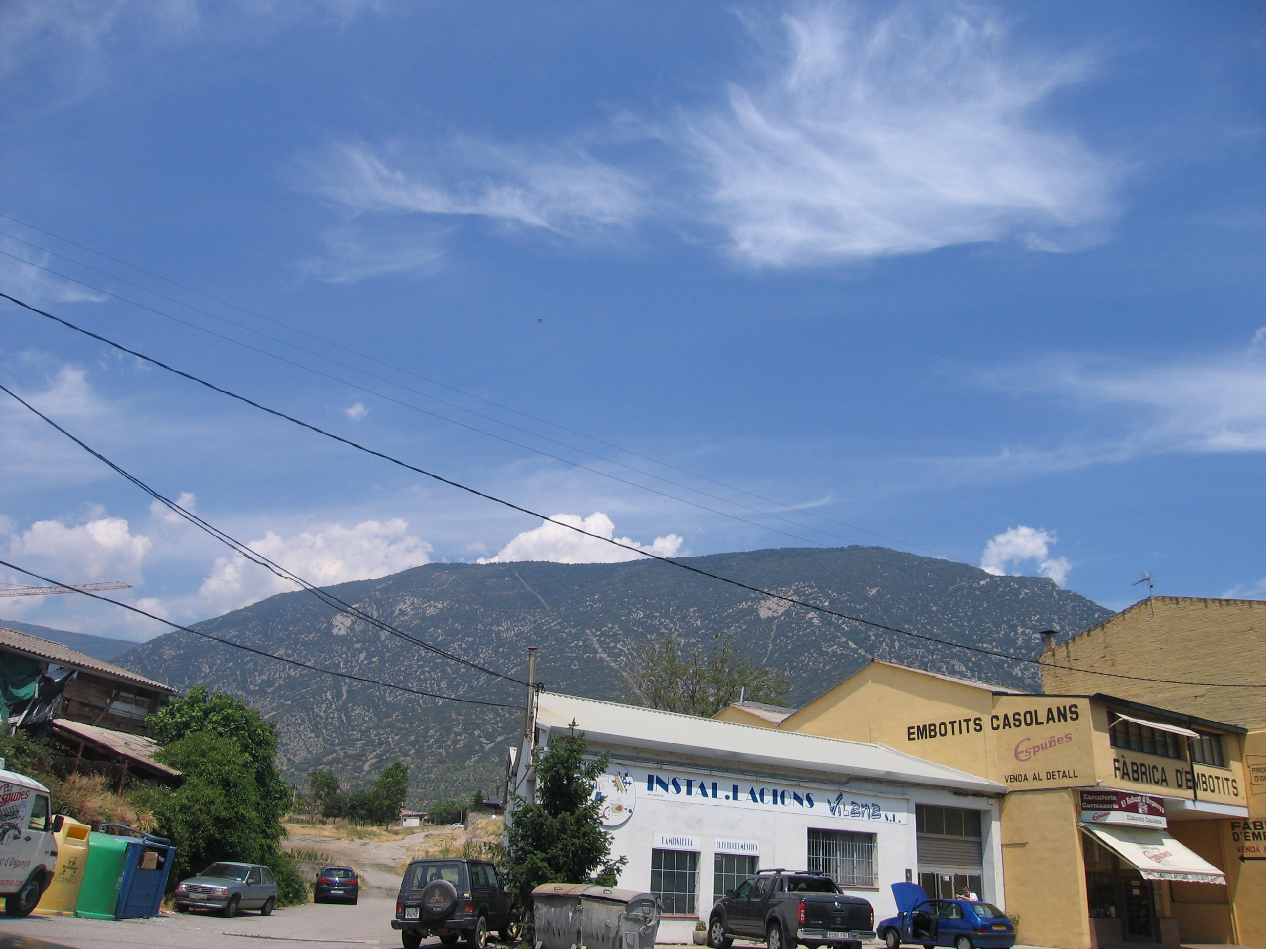 Organya, Spain